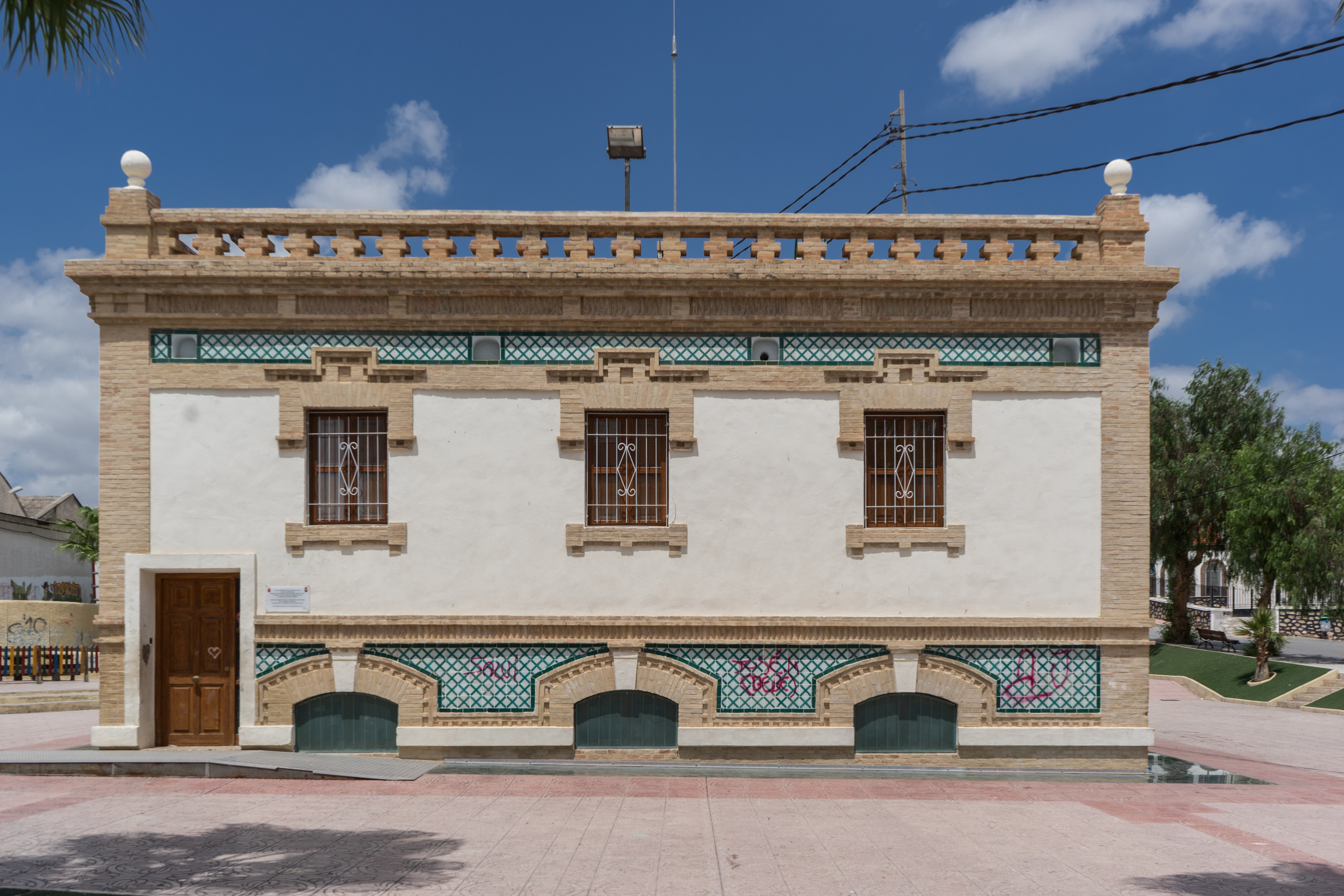 Albergue en la antigua estación de tren de Campos del Rio